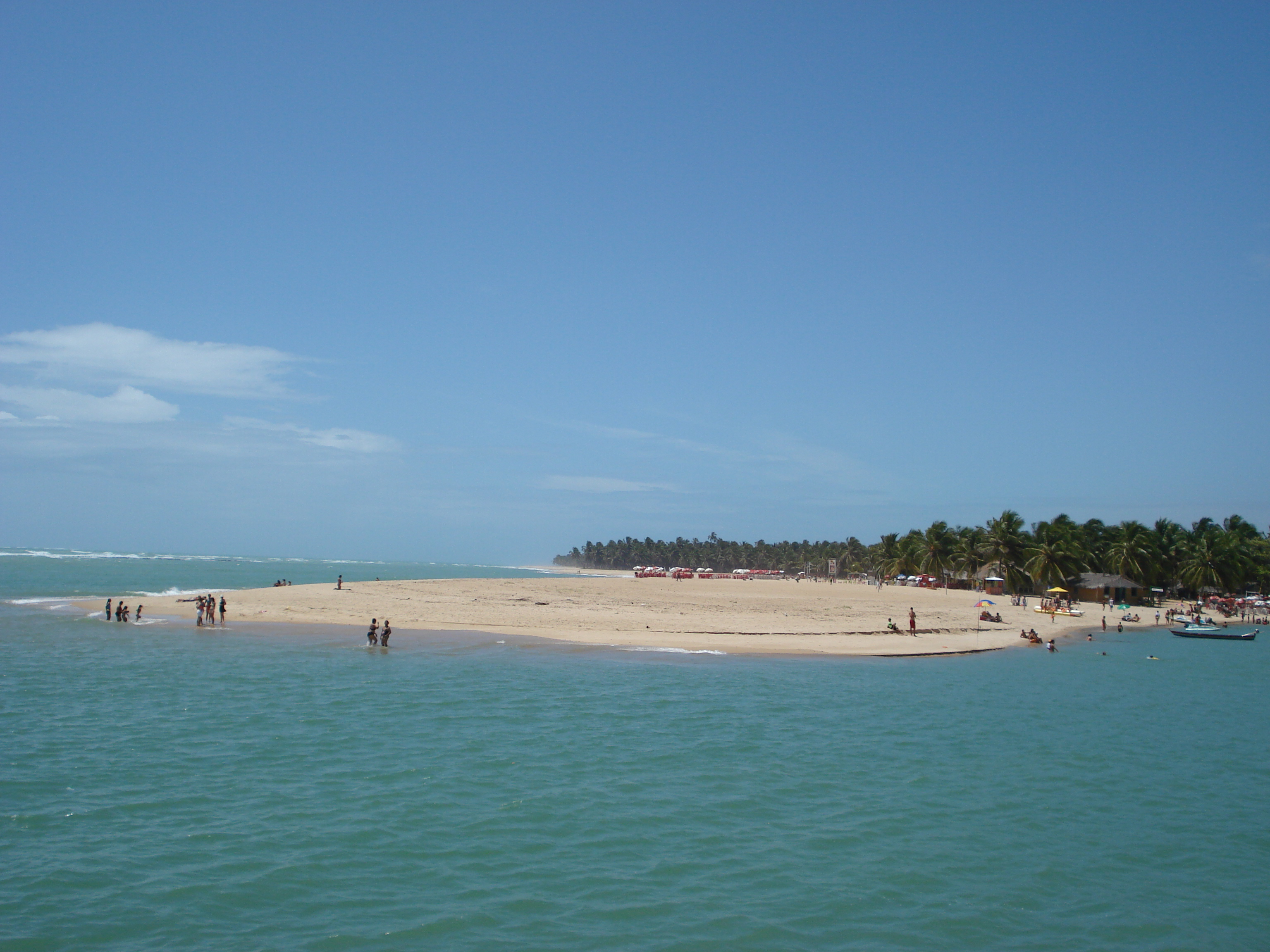 Praia do Gunga